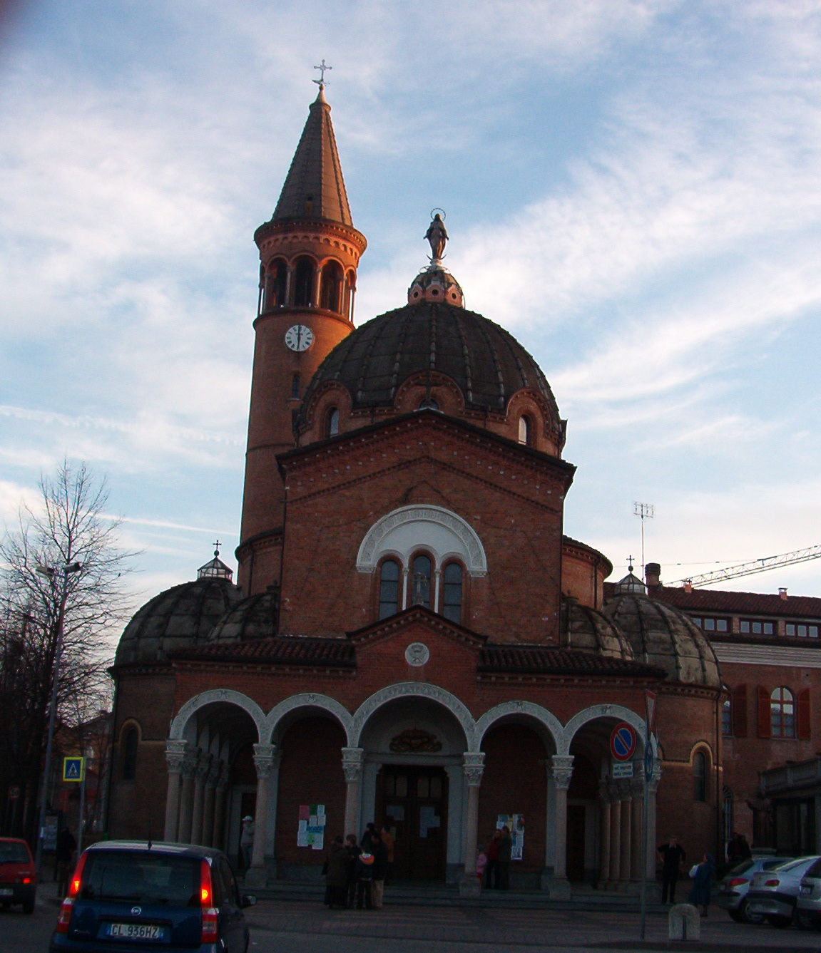 Santuario Nostra Signora della Moretta - Alba - Provincia di Cuneo - Italy